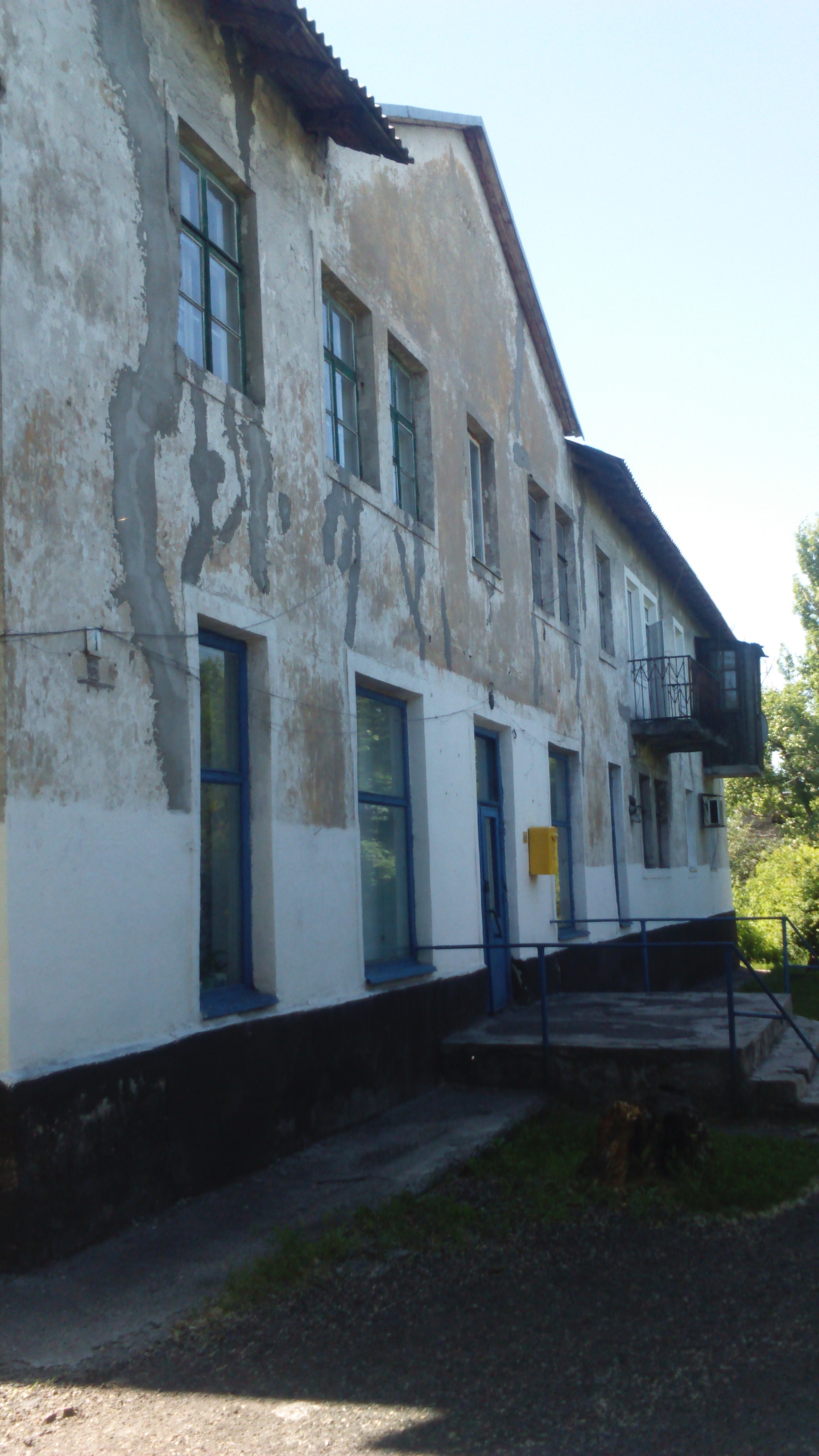 Водя́нське — селище міського типу Донецької області, підпорядковане Білицькому, розташоване на річці Водяна за 93 км від Донецька. Відстань до райцентру становить близько 6 км і проходить автошляхом місцевого значення.